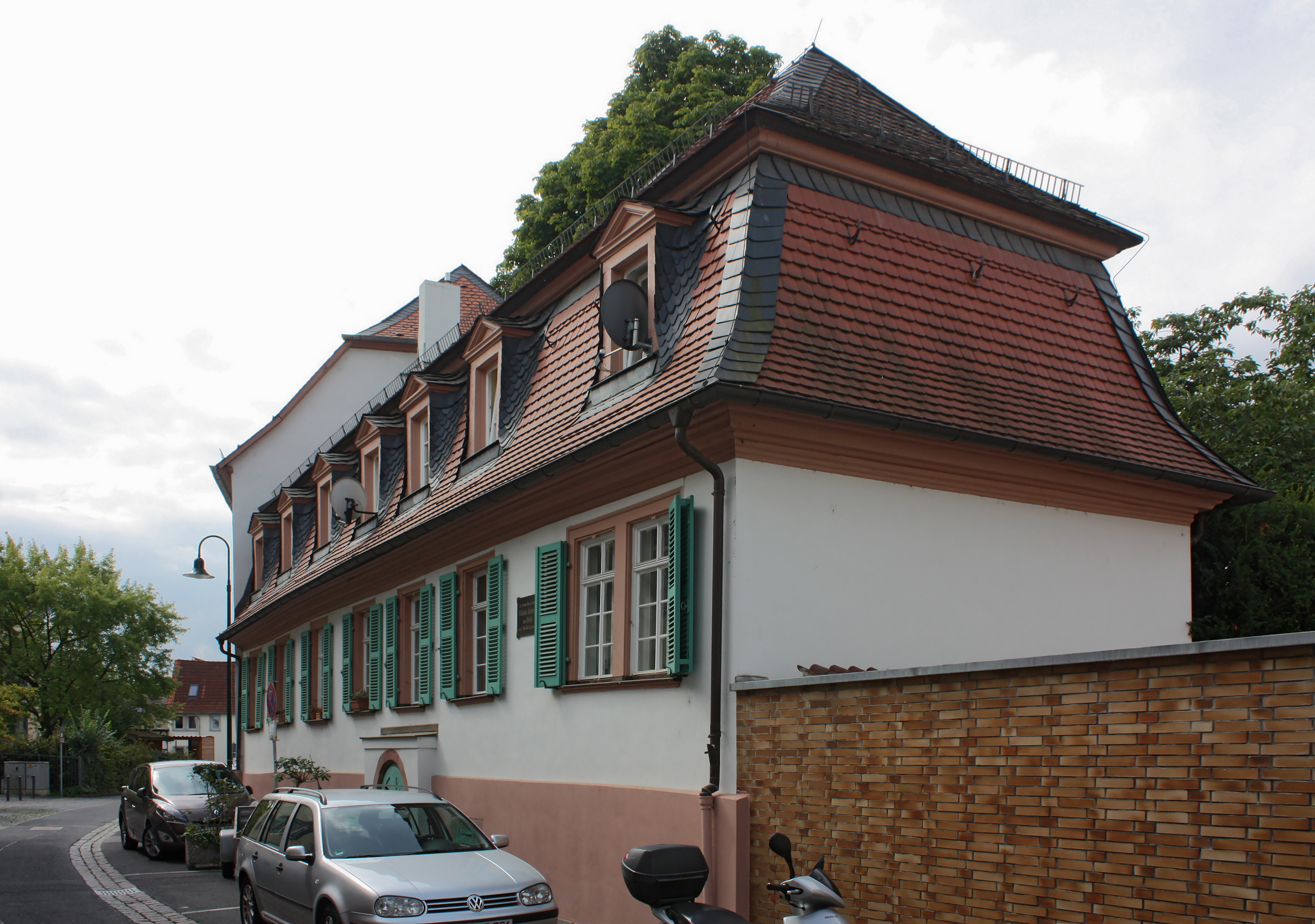 Biebrich, Hessen: Gebutshaus des Schriftsteller Wilhelm Heinrich Riehl (*1823)